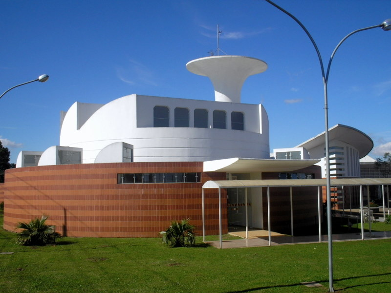 Prédio da Escola Municipal Guilherme Ceolin - Ensino Fundamental, inaugurada em 20 de março de 1999, situada à Rua Guilherme Ceolin, nº 520, Bairro Vargem Grande - Pinhais, PR.